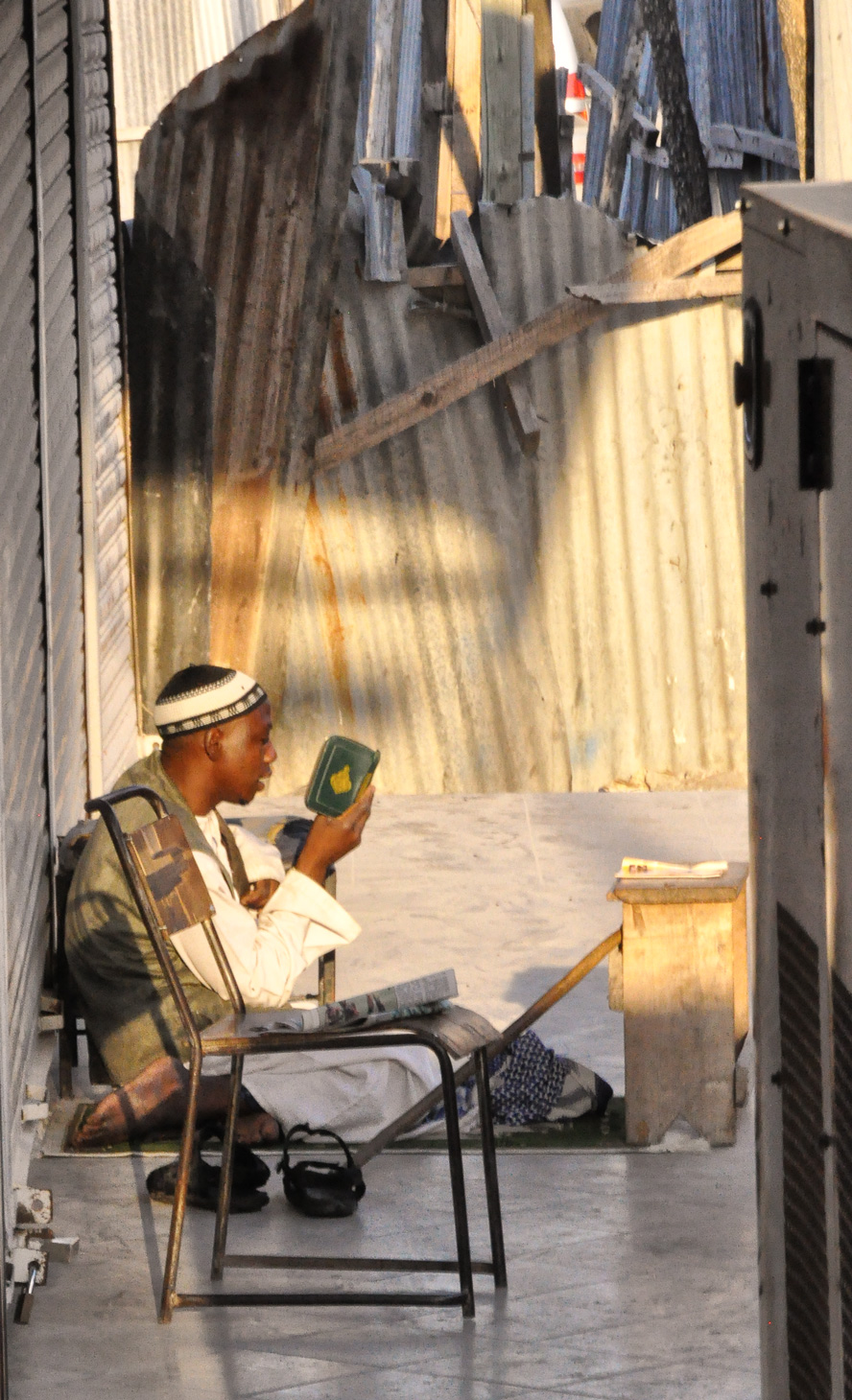 Dar es Salaam, Tanzania